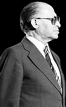 Israeli Prime Minister Menachem Begin